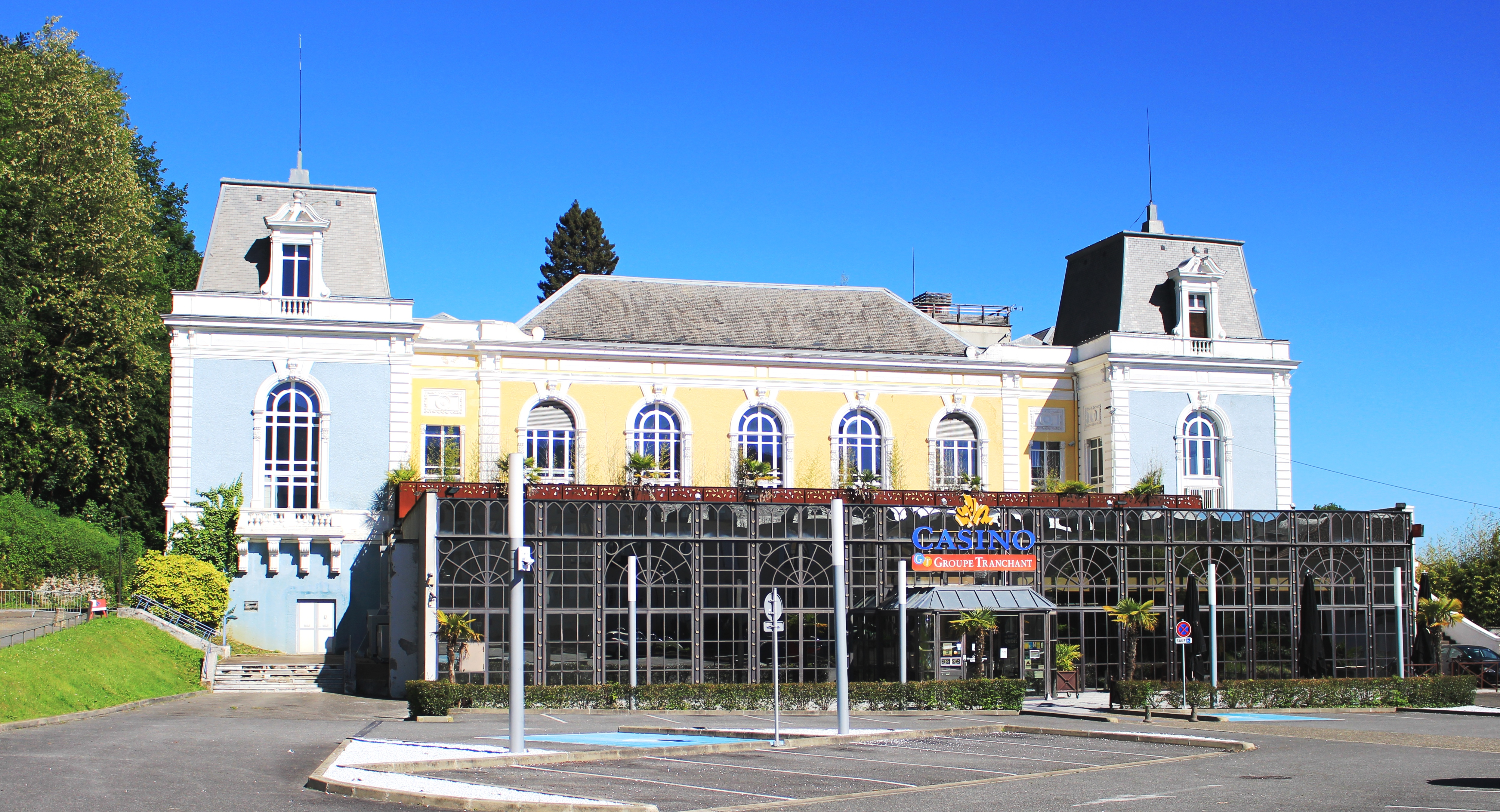 Casino de Bagnères-de-Bigorre (Hautes-Pyrénées)